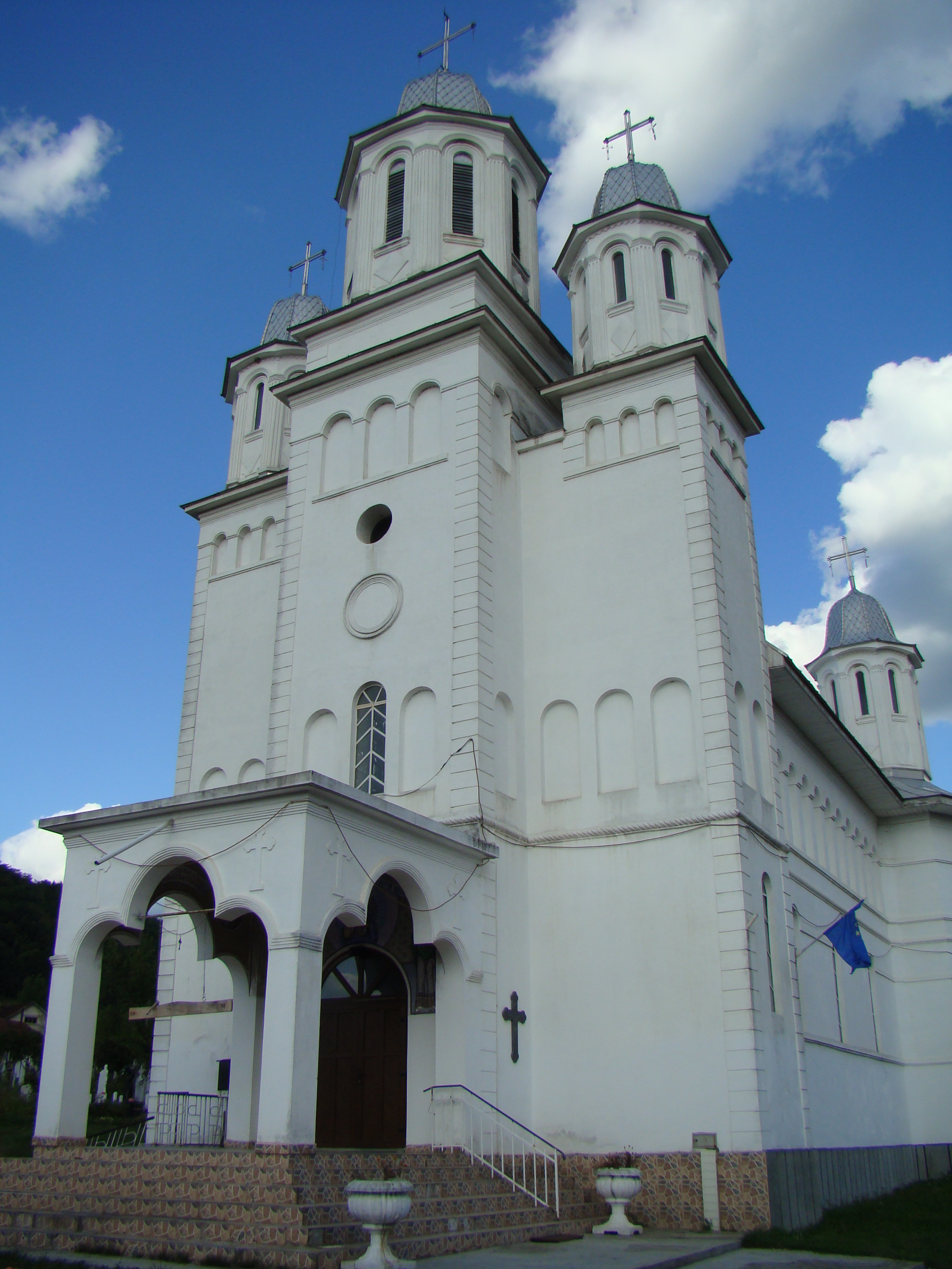 Biserica de lemn din Fânațe-Bihor